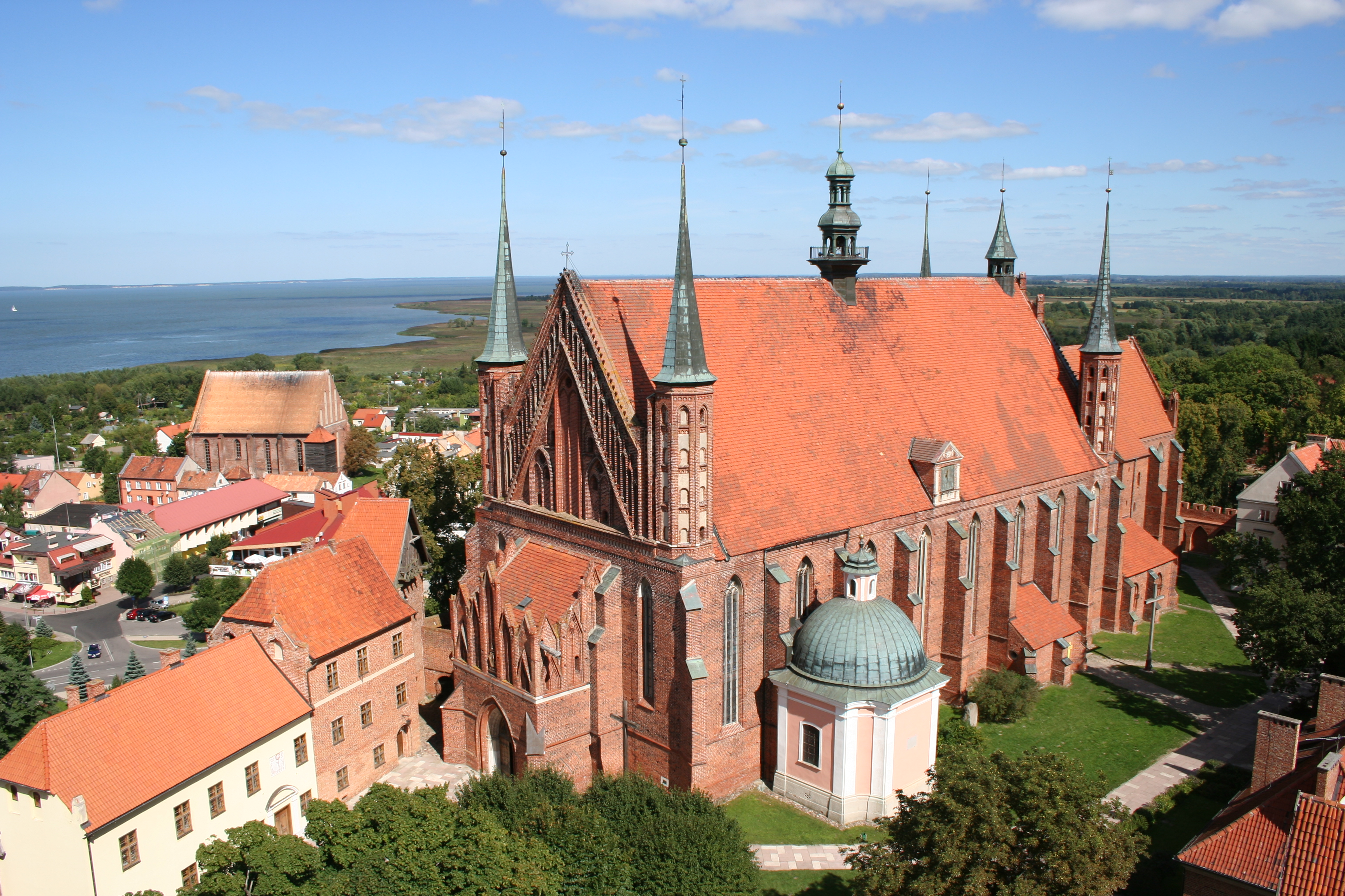 Frombork, katedra pw. Wniebowzięcia NMP i św. Andrzeja, 1329-1388, 1 poł. XVIII